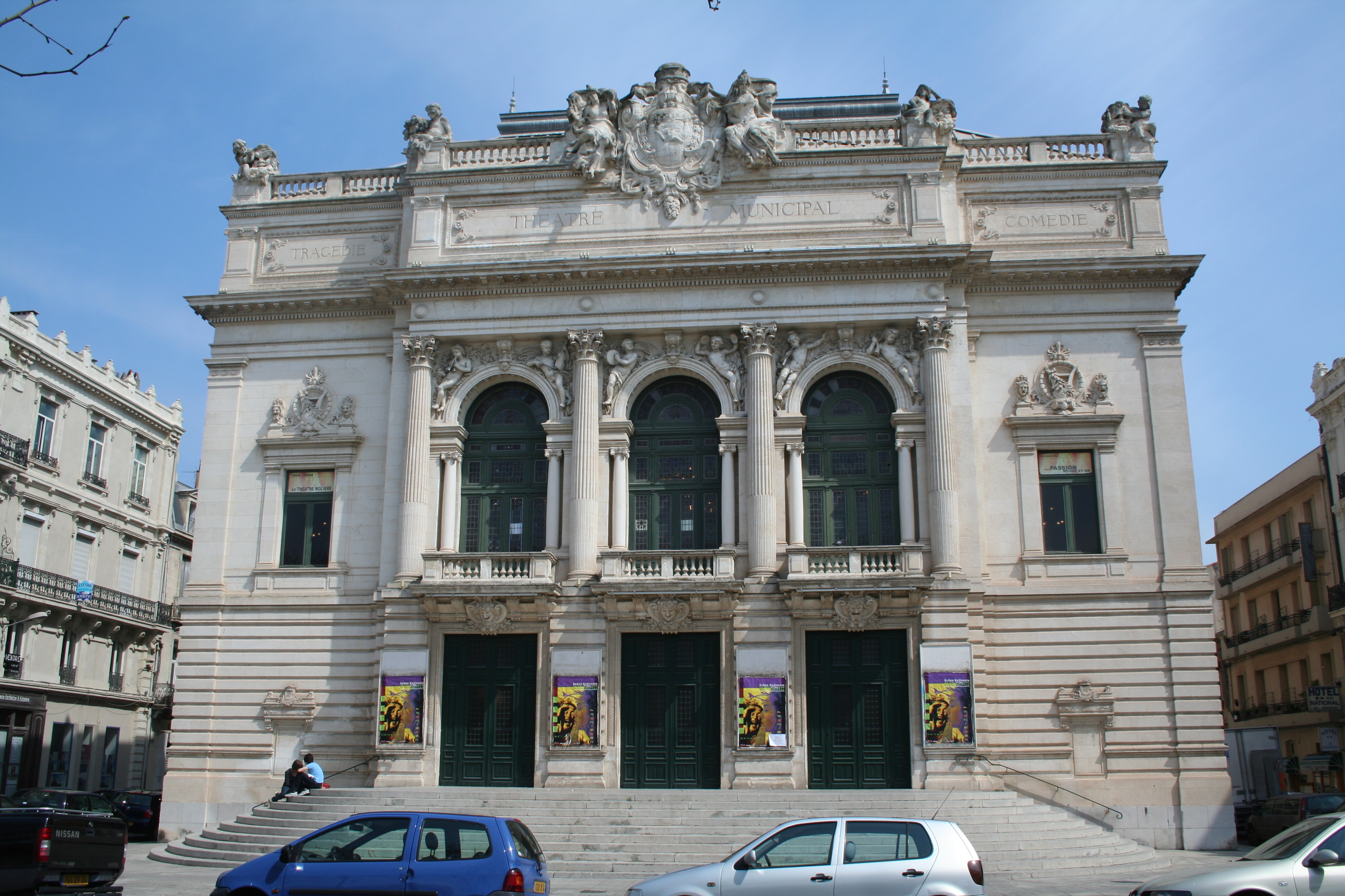 Sète (Hérault) - Théâtre Molière (avant 2013) - Scène Nationale de Sète et du Bassin de Thau. Inauguré le 9 April 1904. Sculptures de la façade de Jean-Antoine Injalbert.